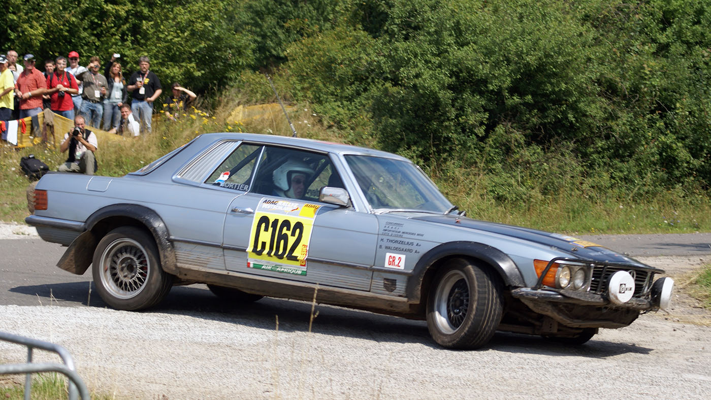 Mercedes 450 SLC bei der Classic-Rallye Deutschland 2008